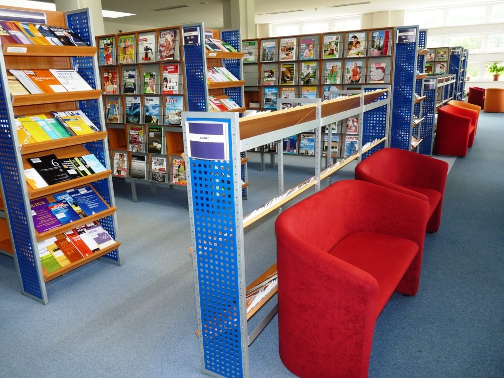 Pohled na řazení periodik ve volném výběru čítárny.